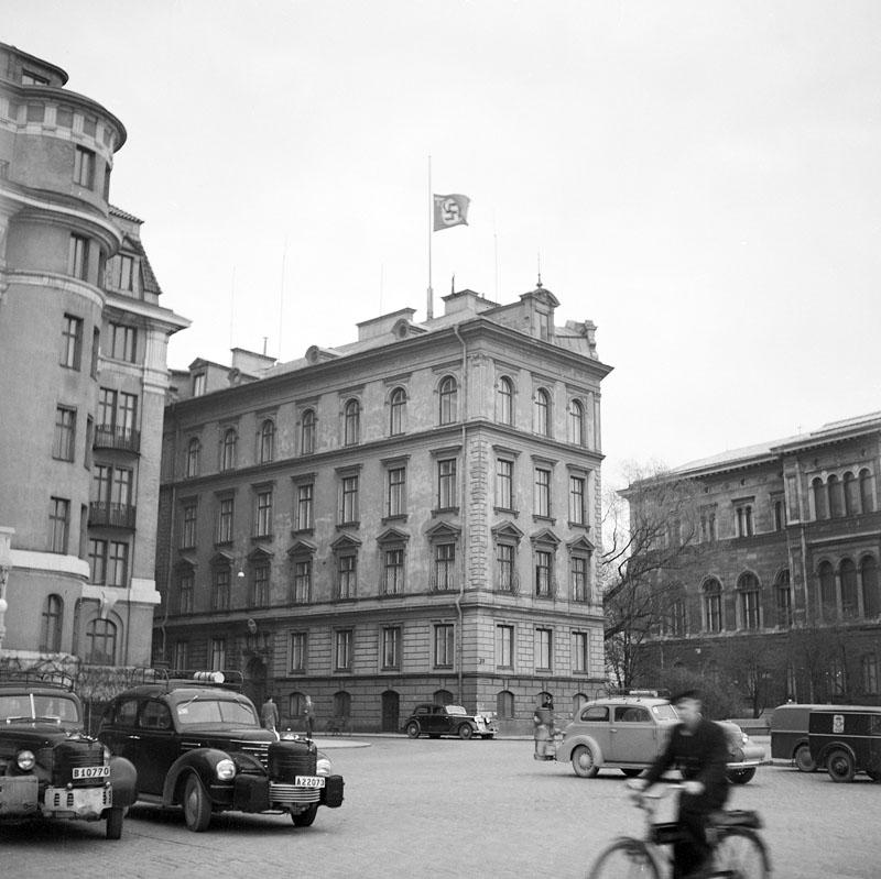 F.d. Tyska legationen flaggar på halv stång på Hitlers dödsdag den 30 april 1945 Kvarteret SILLHOVET. Blasieholmen. Hovslagargatan 2. Södra Blasieholmshamnen. Norrmalm.